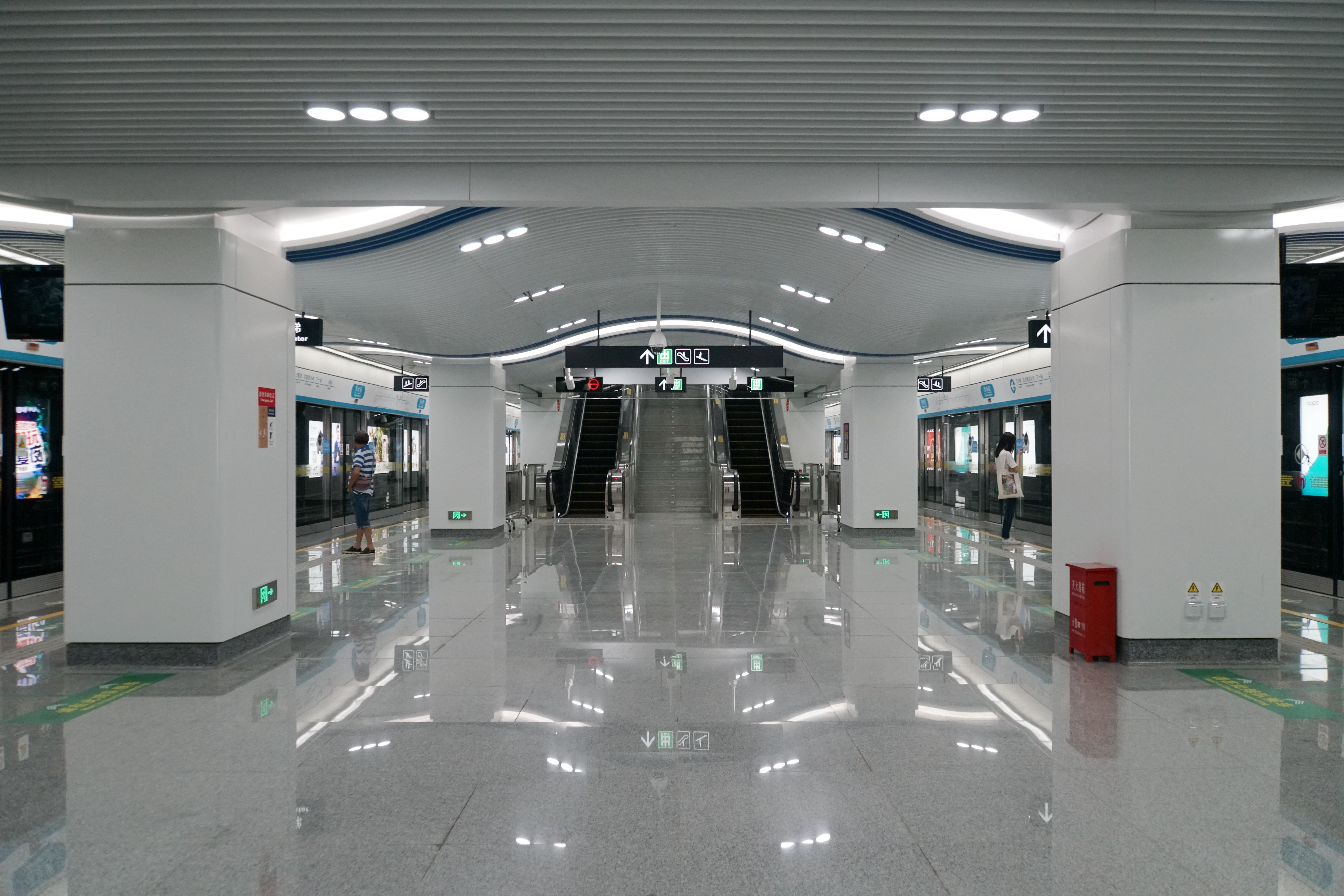 萍水街站站台